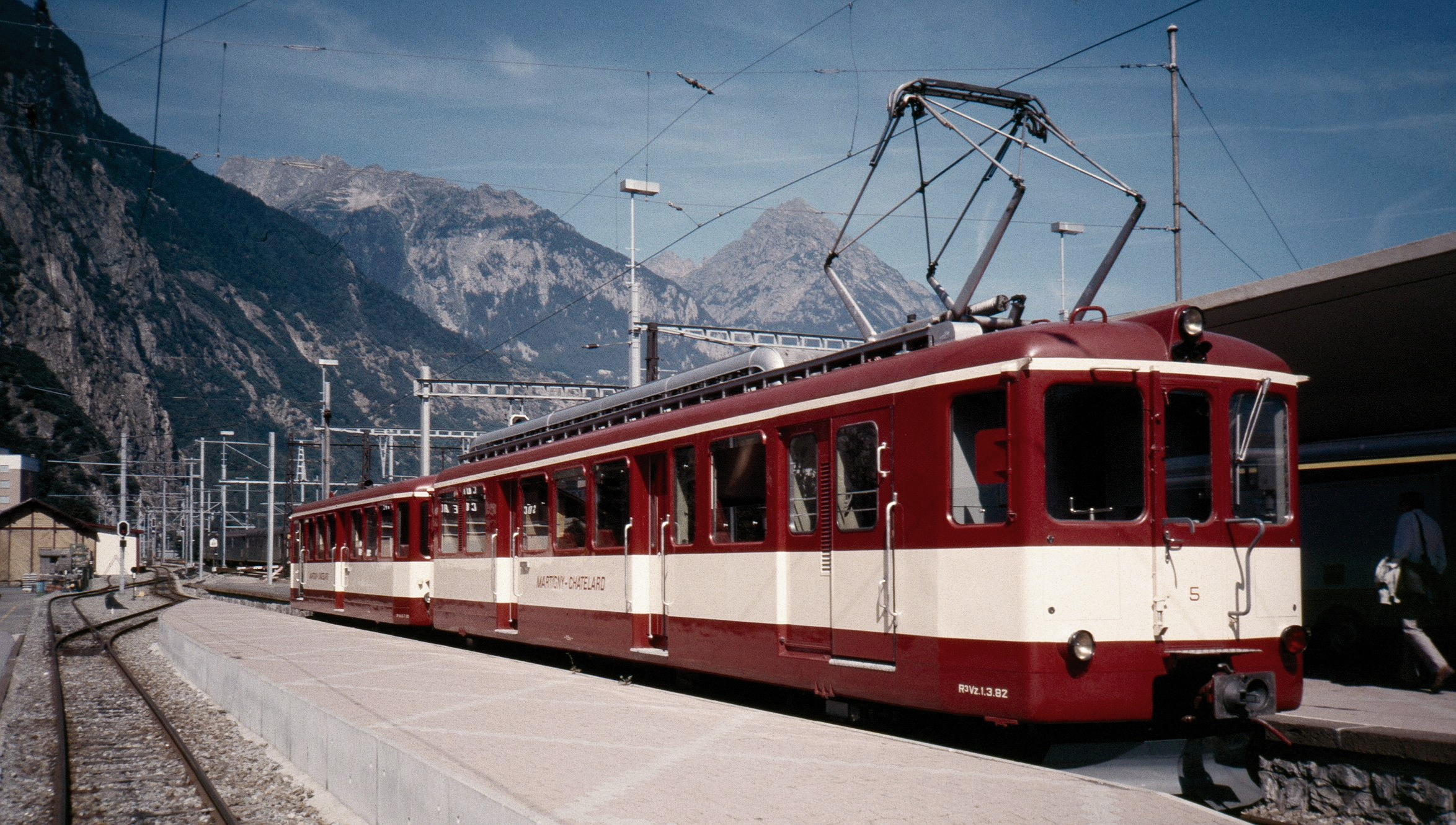 Triebwagen 5 mit Steuerwagen in Martigny